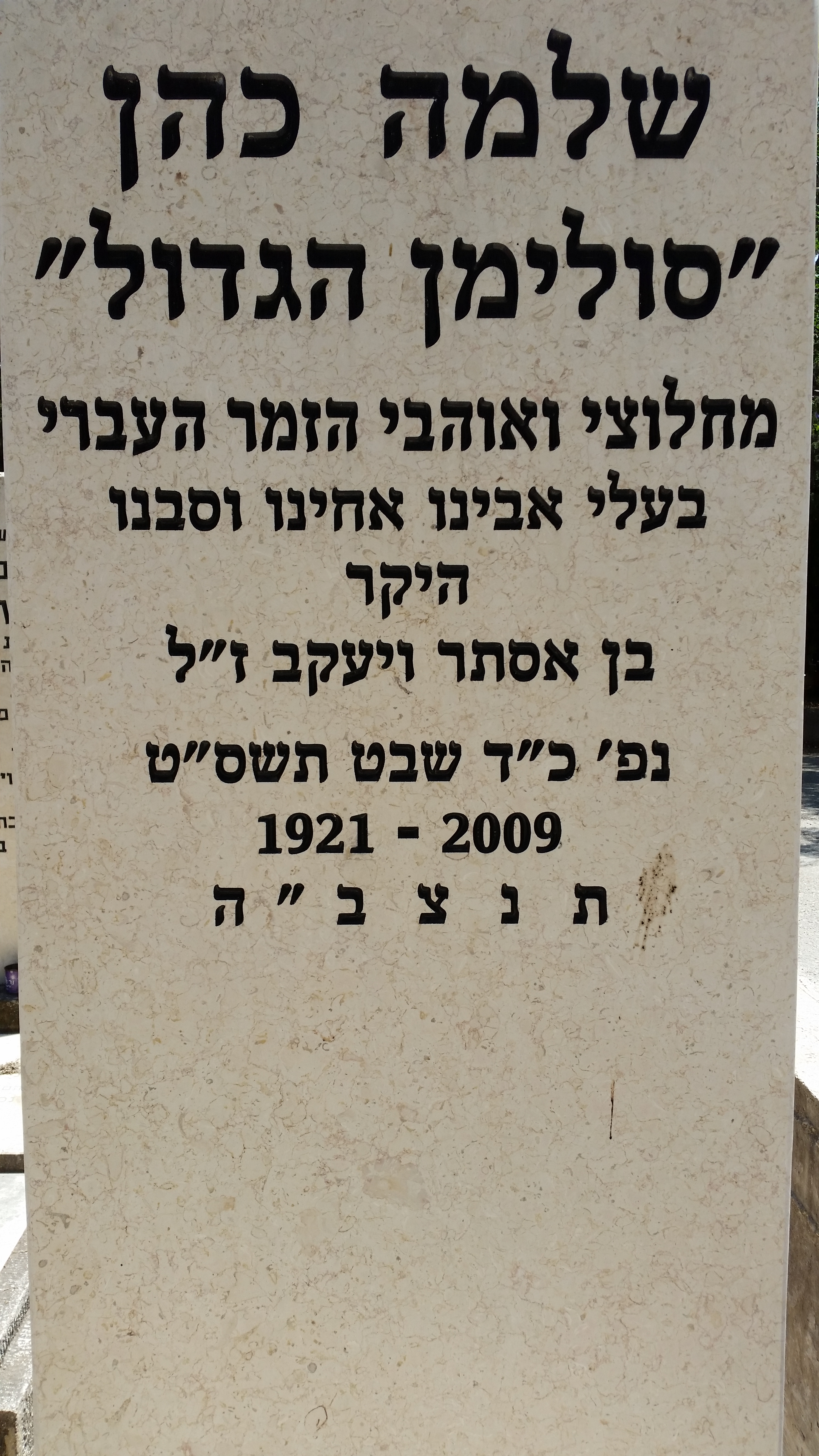 קברו של הזמר שלמה כהן "סולימן הגדול" בבית הקברות נחלת יצחק